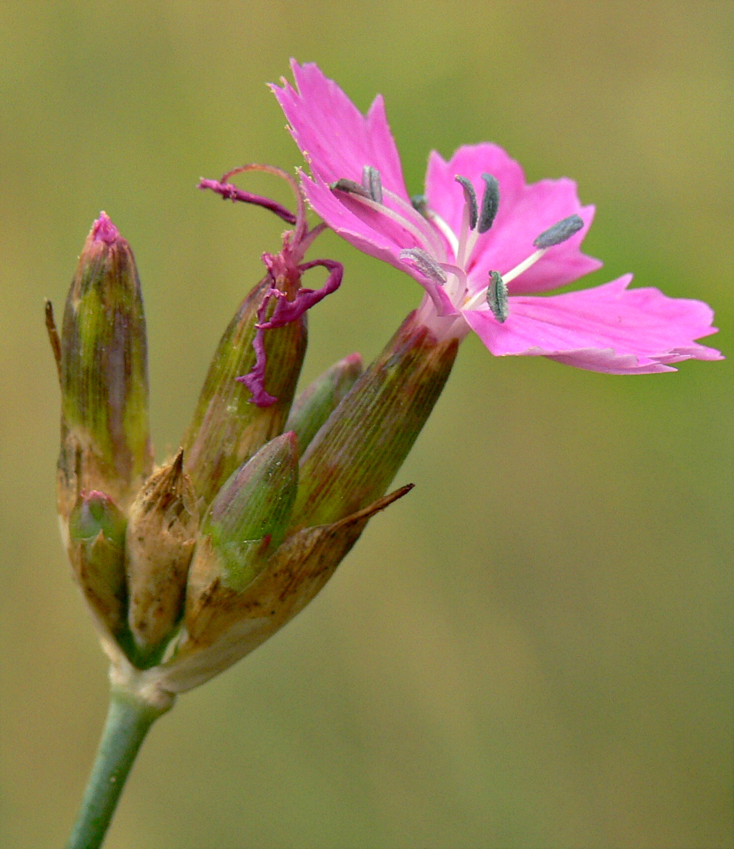 Tartós szegfű (Dianthus diutinus) Nagykőrösön